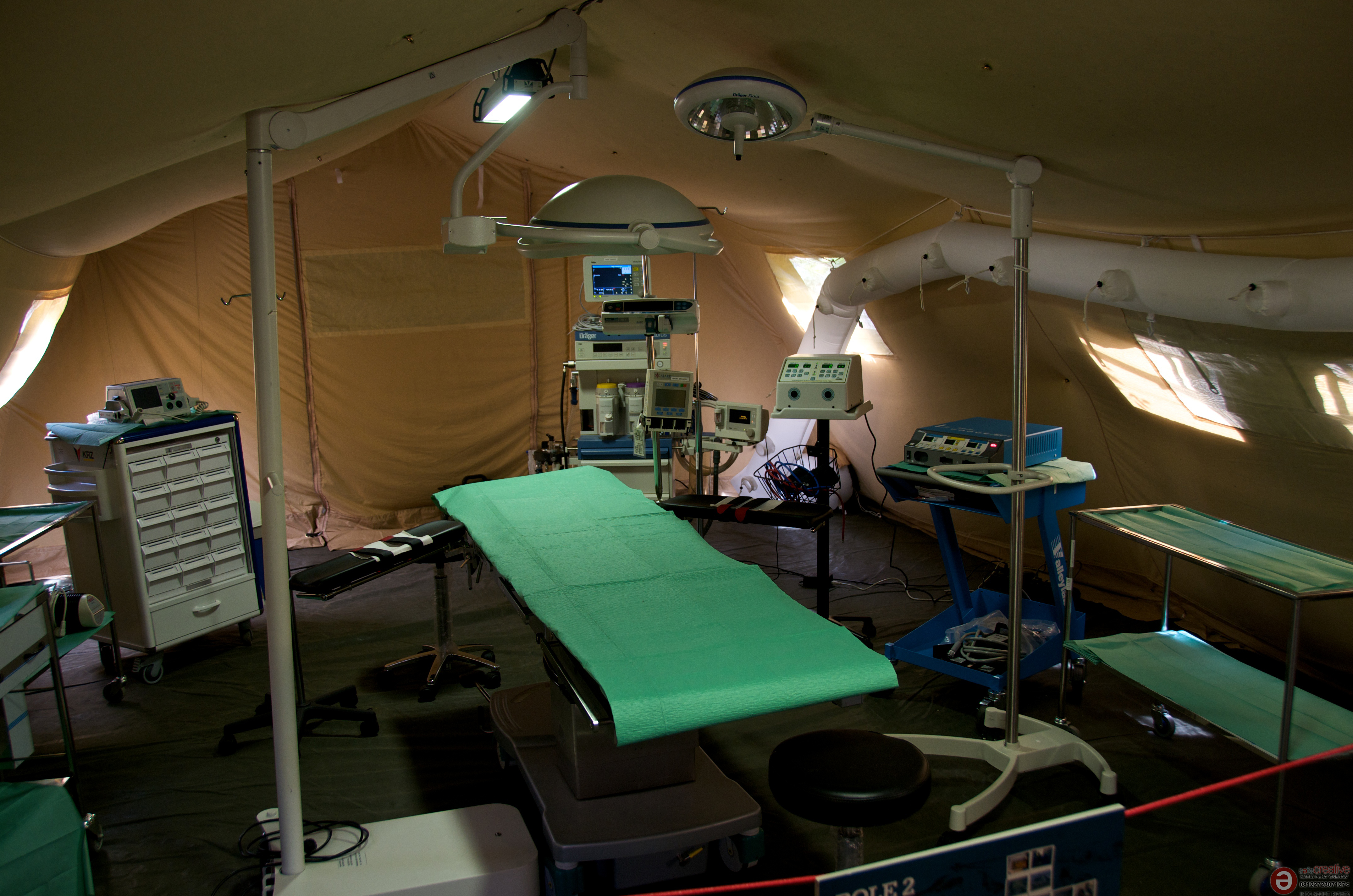 Día de la Fuerzas Armadas de España. Zaragoza.